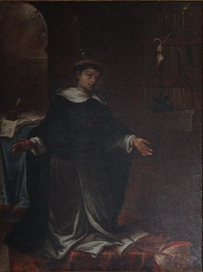 La obra representa, a juzgar por el hábito del monje, a un santo dominico, por lo que podría tratarse de Santo Tomás de Aquino o de San Luis Beltrán.